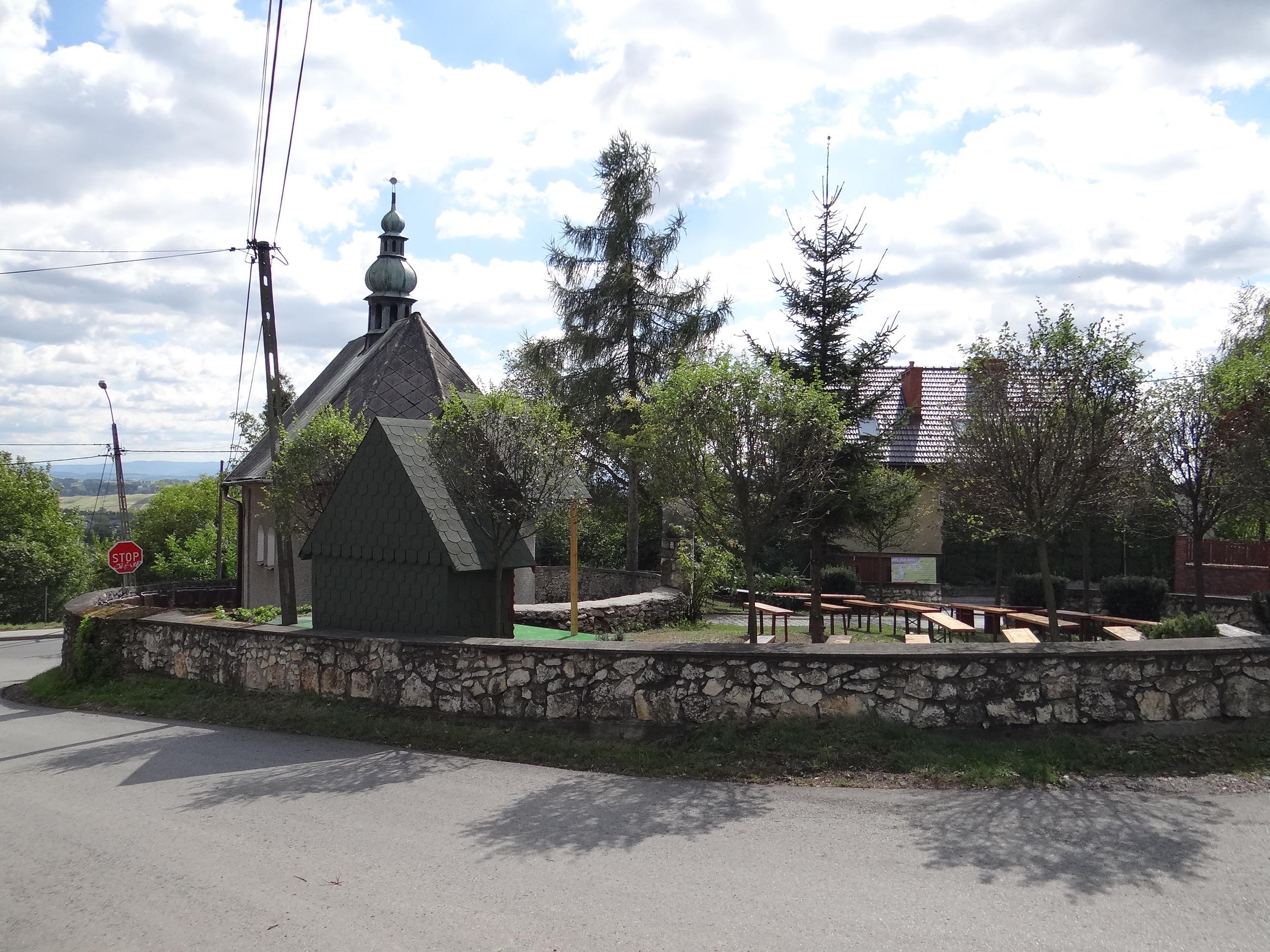 Czułów, zespół kaplicy pw. Matki Boskiej, 1869